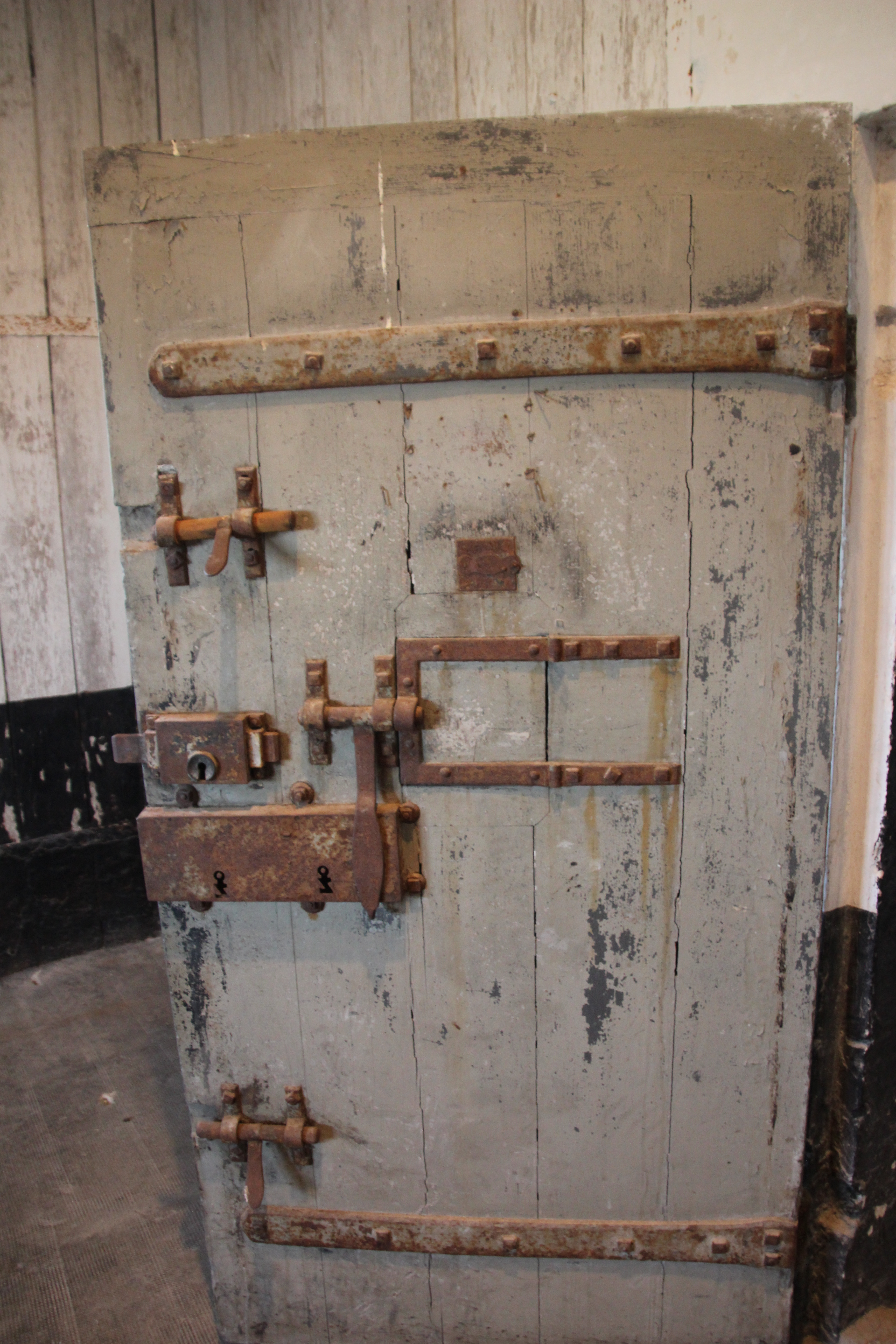 Ancienne prison (Pont-l'Évêque, Calvados)